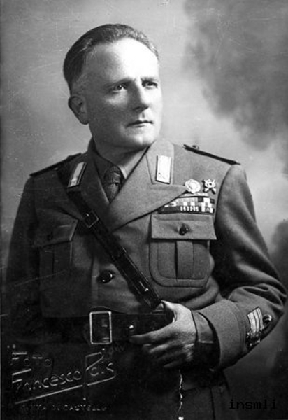 Venanzio Gabriotti resistant Italien world war II